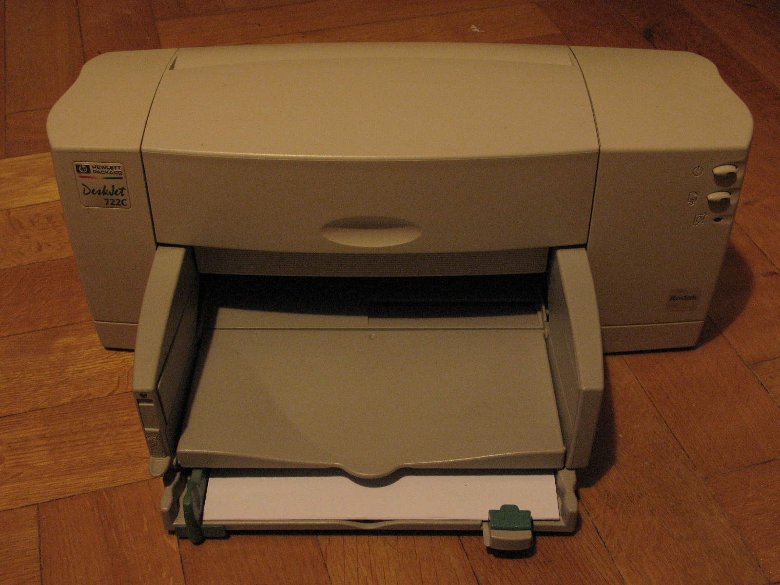 Ink Jet printer HP Desk Jet 722c